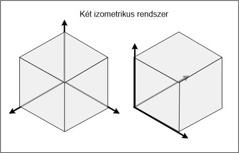 Izometrikus nézetrajzok